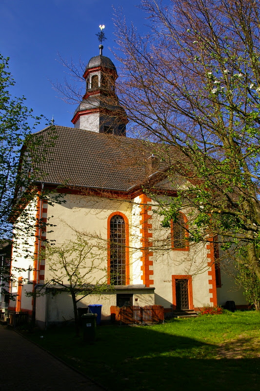 Evangelische Kirche Rupppertsburg, Laubach, Landkreis Gießen, Hessen, Deutschland